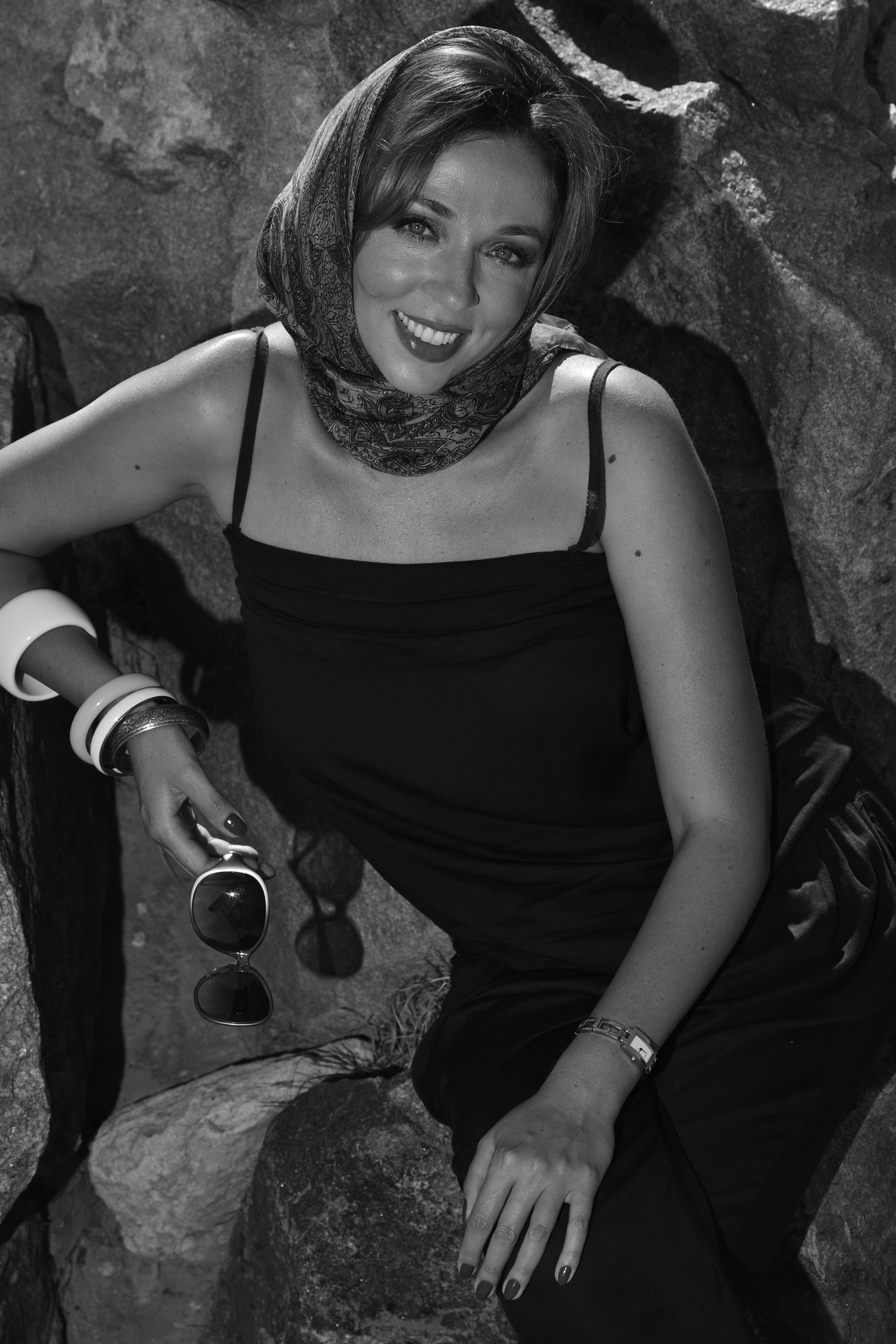 Olena Karpenko